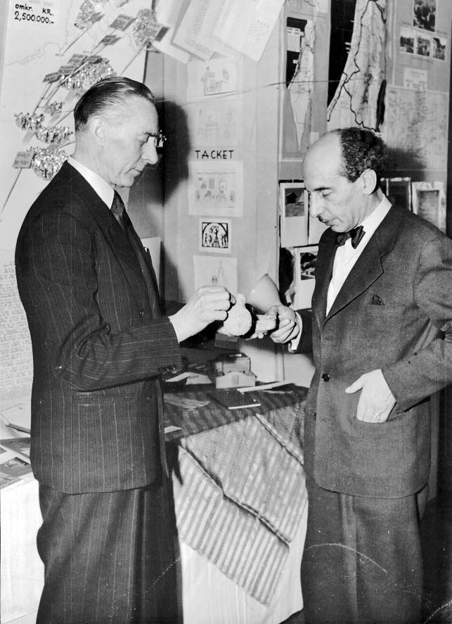 Missionsdirektör Birger Pernow och pastor Johannes Jellinek med en lampa från Mose tid.År 1875 inledde Svenska Israelsmissionen sin verksamhet i Oran och året därpå i Beirut. År 1950 inför 75-årsjubiléethar verksamheten upptagits i Marocko med station i Casablanca, och för ett par år sedan öppnade också en station i Jerusalem vilken kommer att utvecklas till en teologisk forskningsstation.